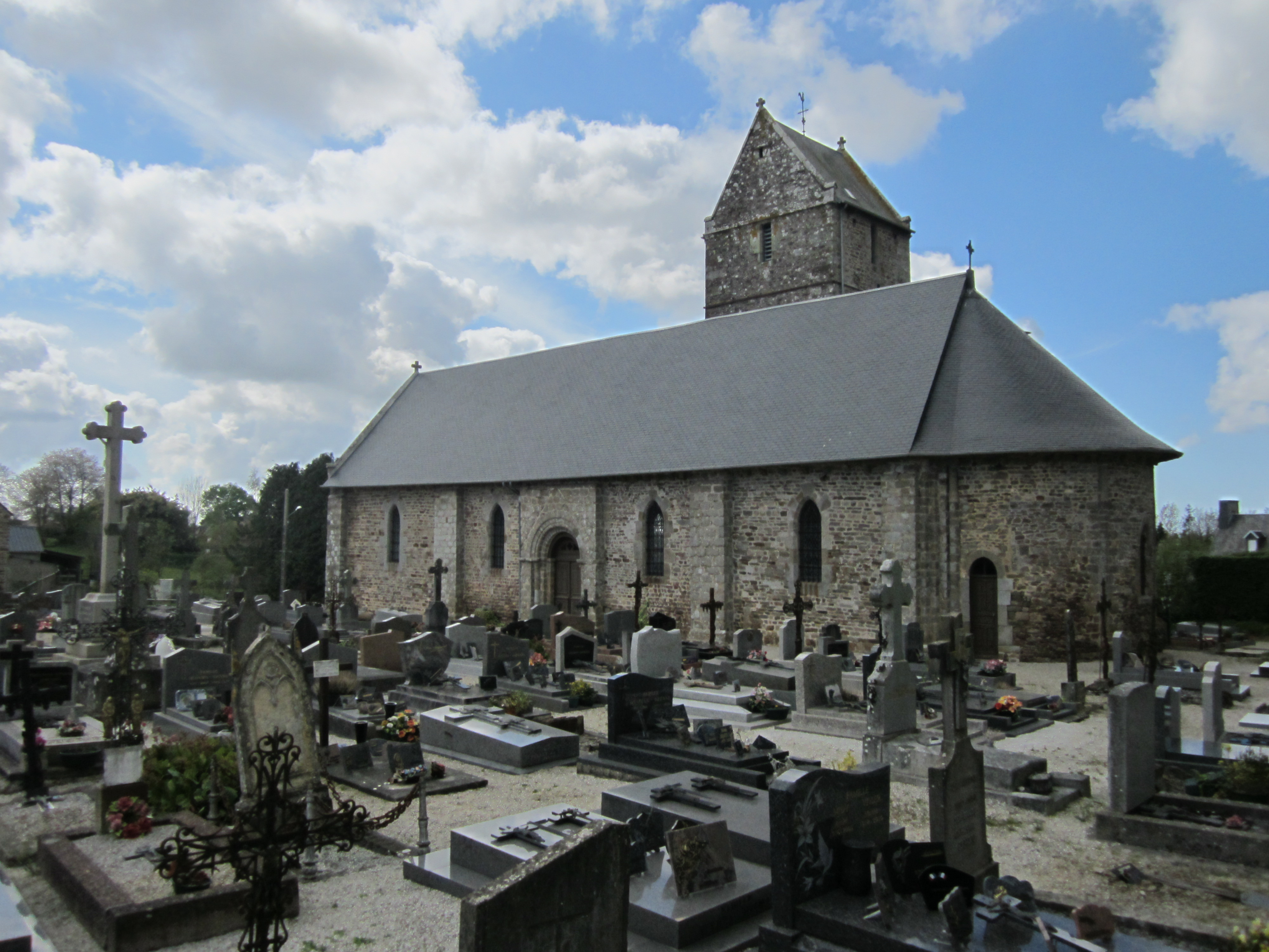 Le Tanu, Manche